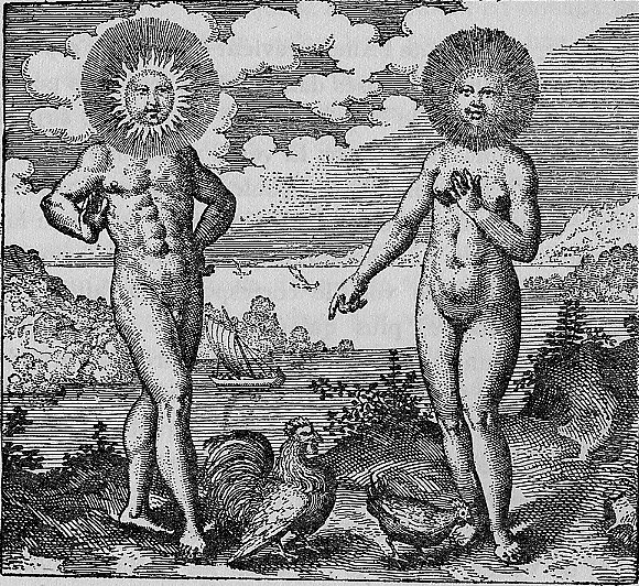 Emblem 30